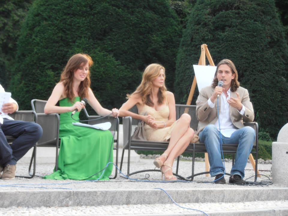 Una parte del cast del film "Il pretore" di Giulio Base alla conferenza stampa di presentazione delle riprese, a Varese. Da sinistra a destra Sarah Maestri, Eliana Miglio e Mattia Zaccaro Garau.